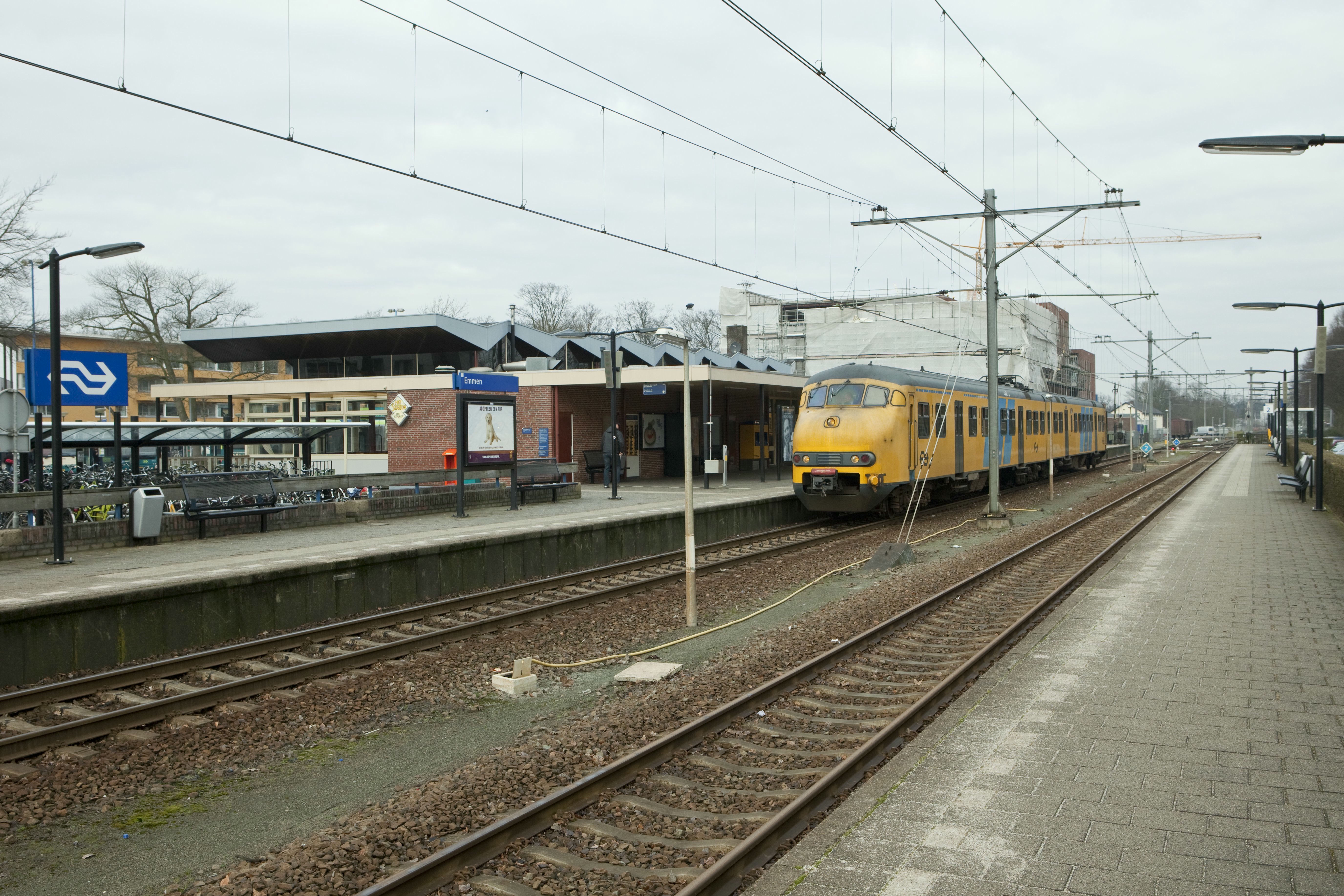 NS Station: Overzicht van het station, gezien vanaf de spoorwegovergang